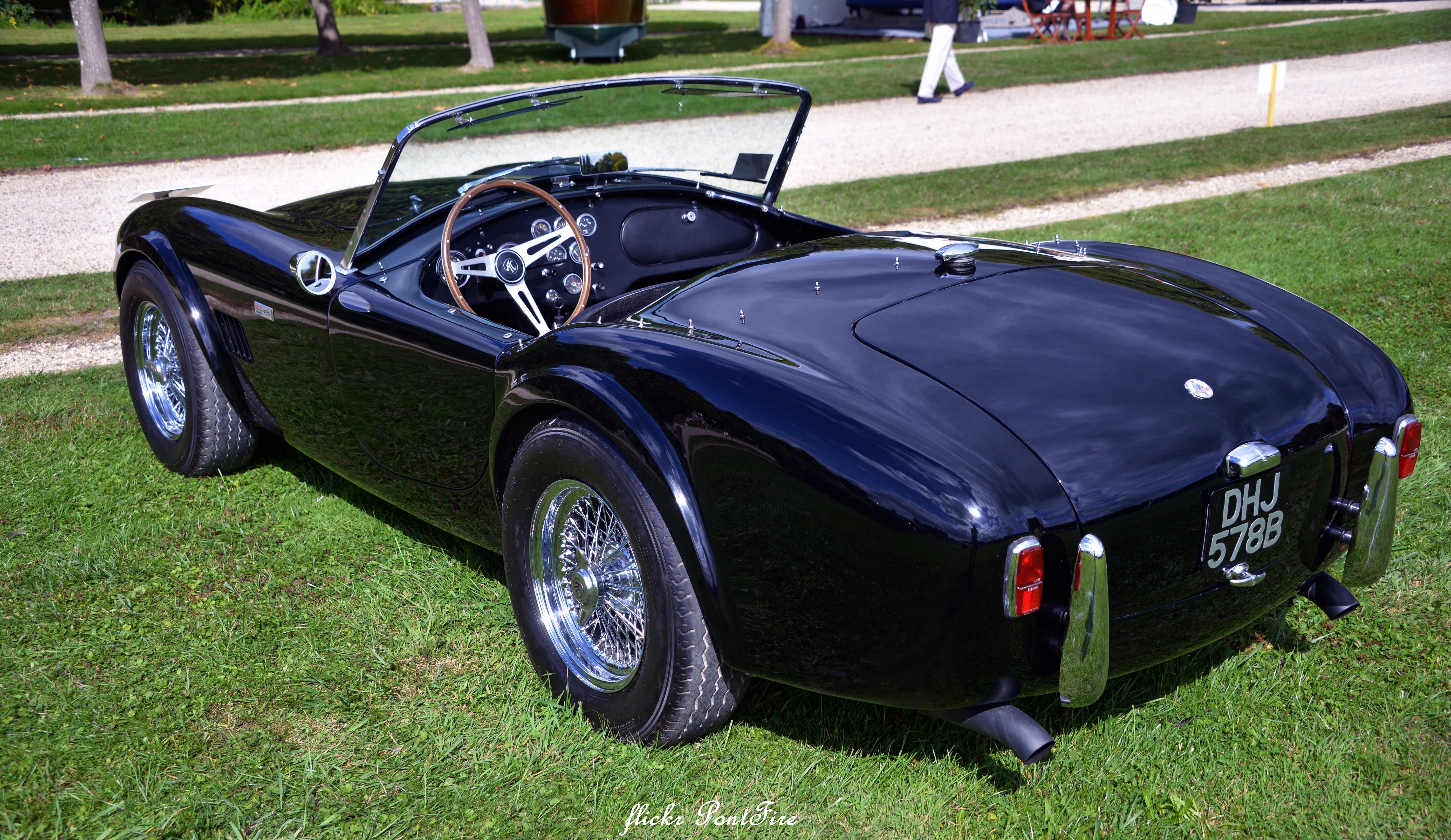 Chantilly Arts & Elegance Richard Mille 2015